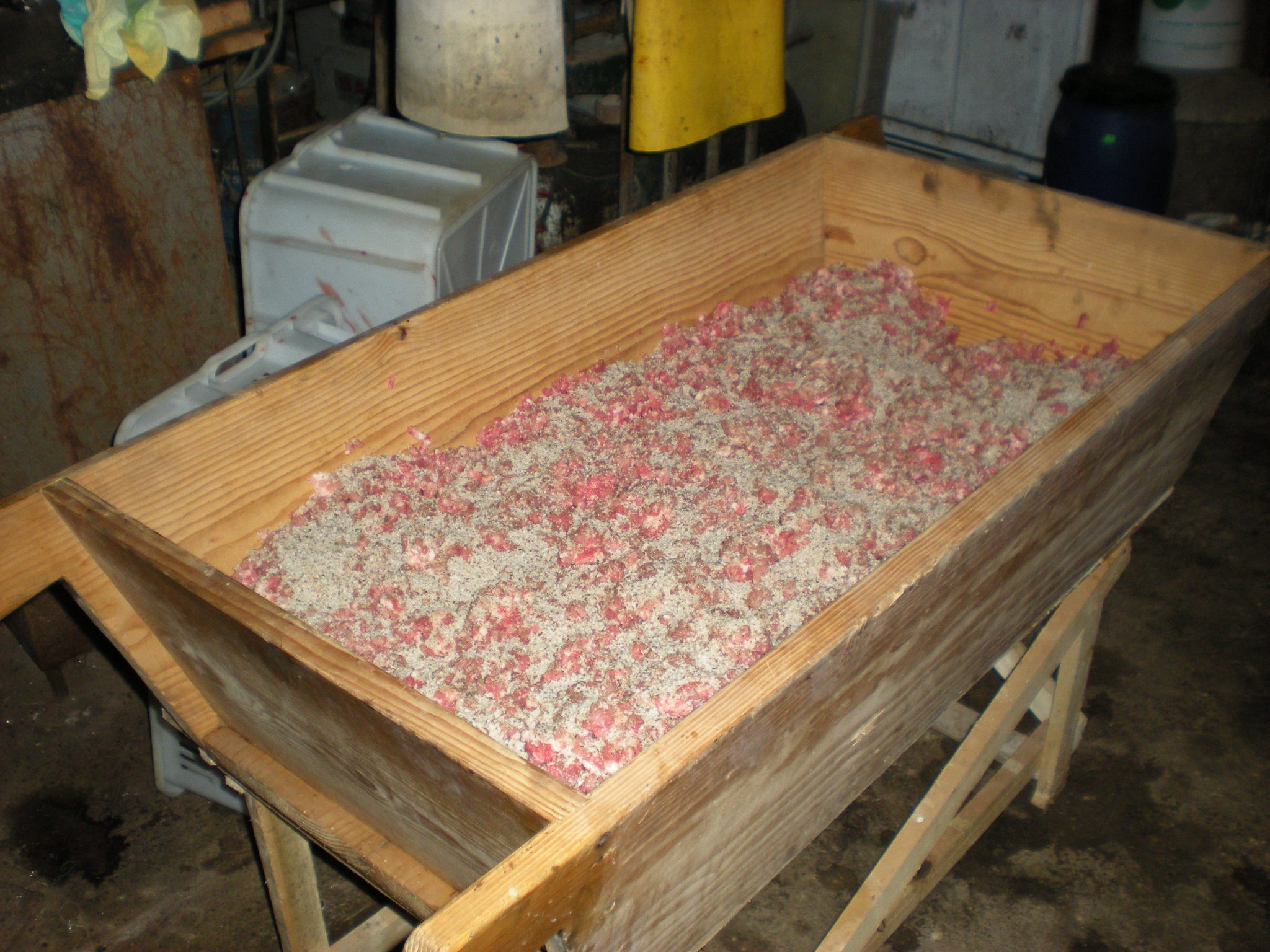 Arte e tradizioni - La concia del Salame Mantovano